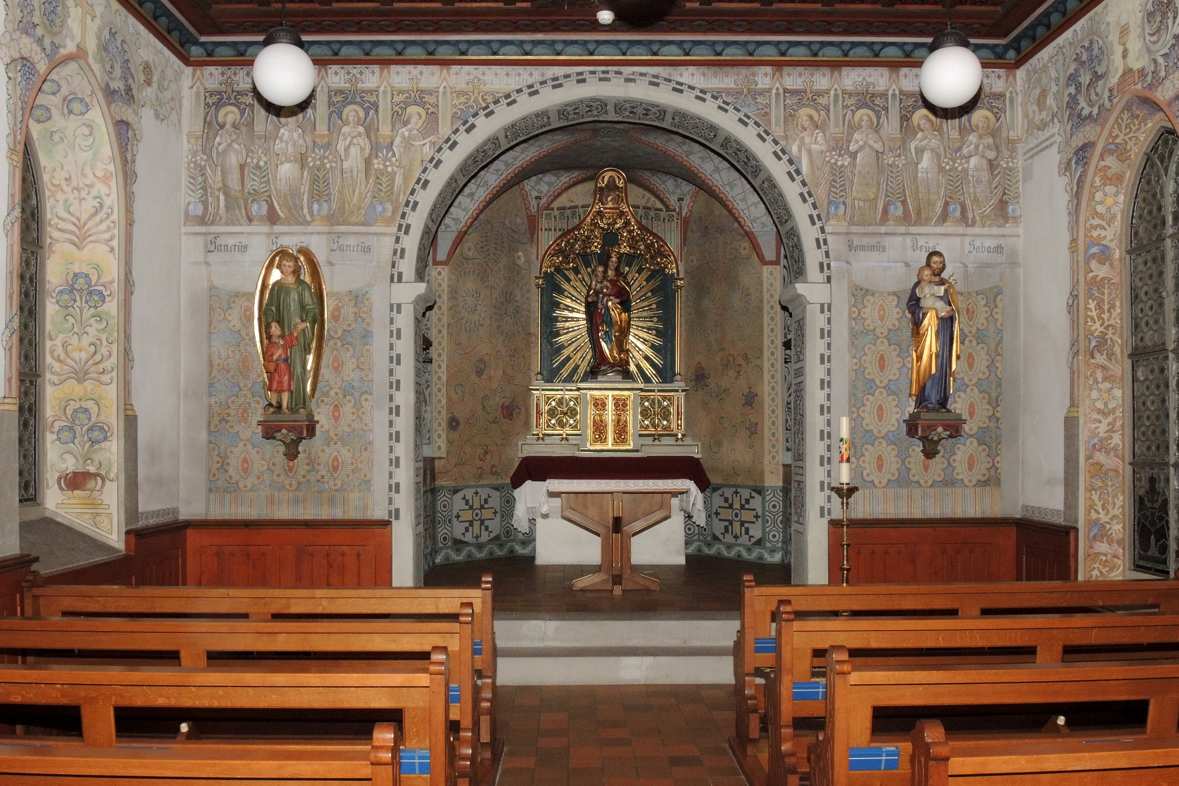 Liebfrauenkapelle (St. Mary's Chapel) in Rapperswil (Switzerland) as seen from Stadtpfarrkirche (St. John's Church)